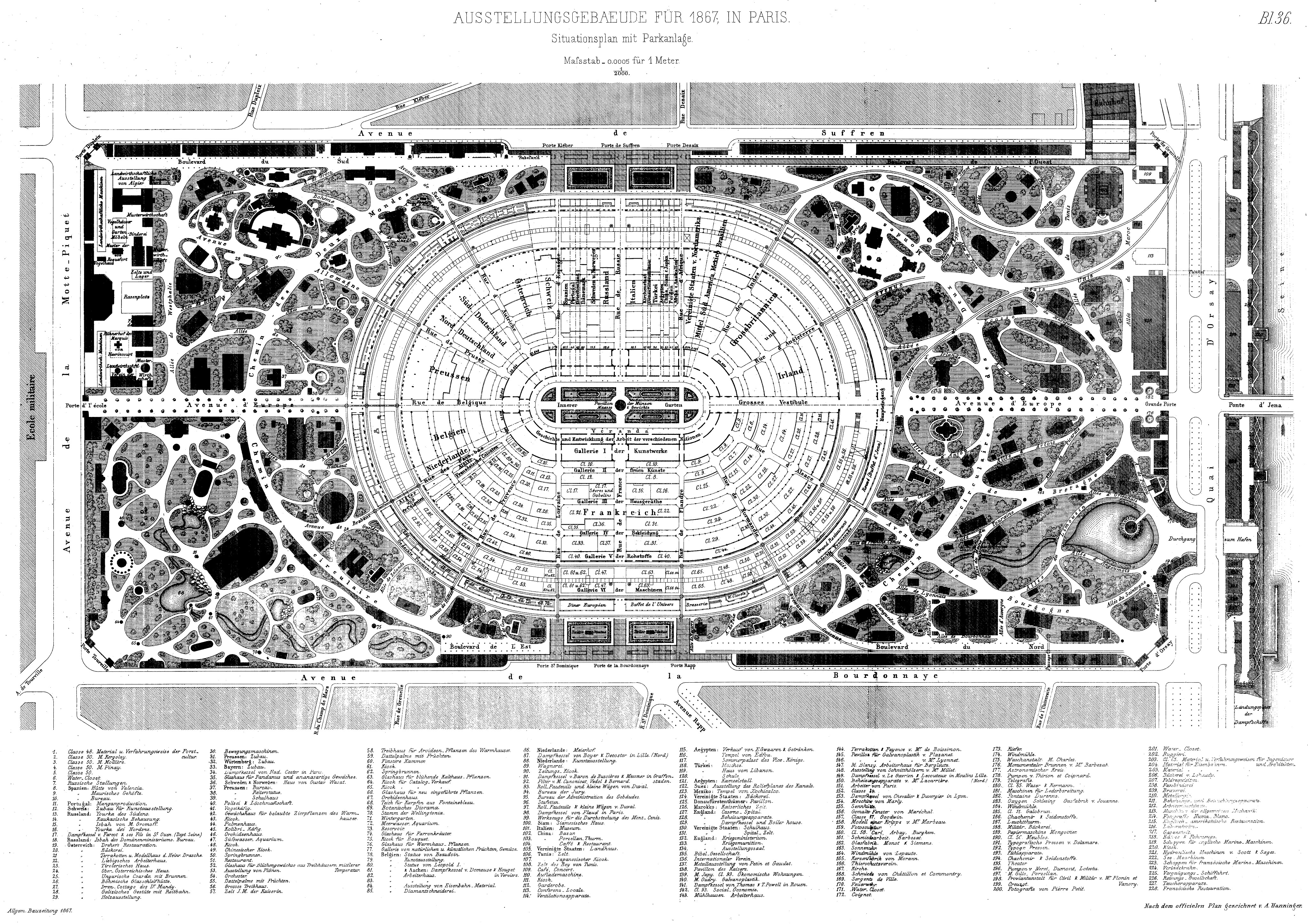 Paris, Weltausstellung 1867, Lageplan